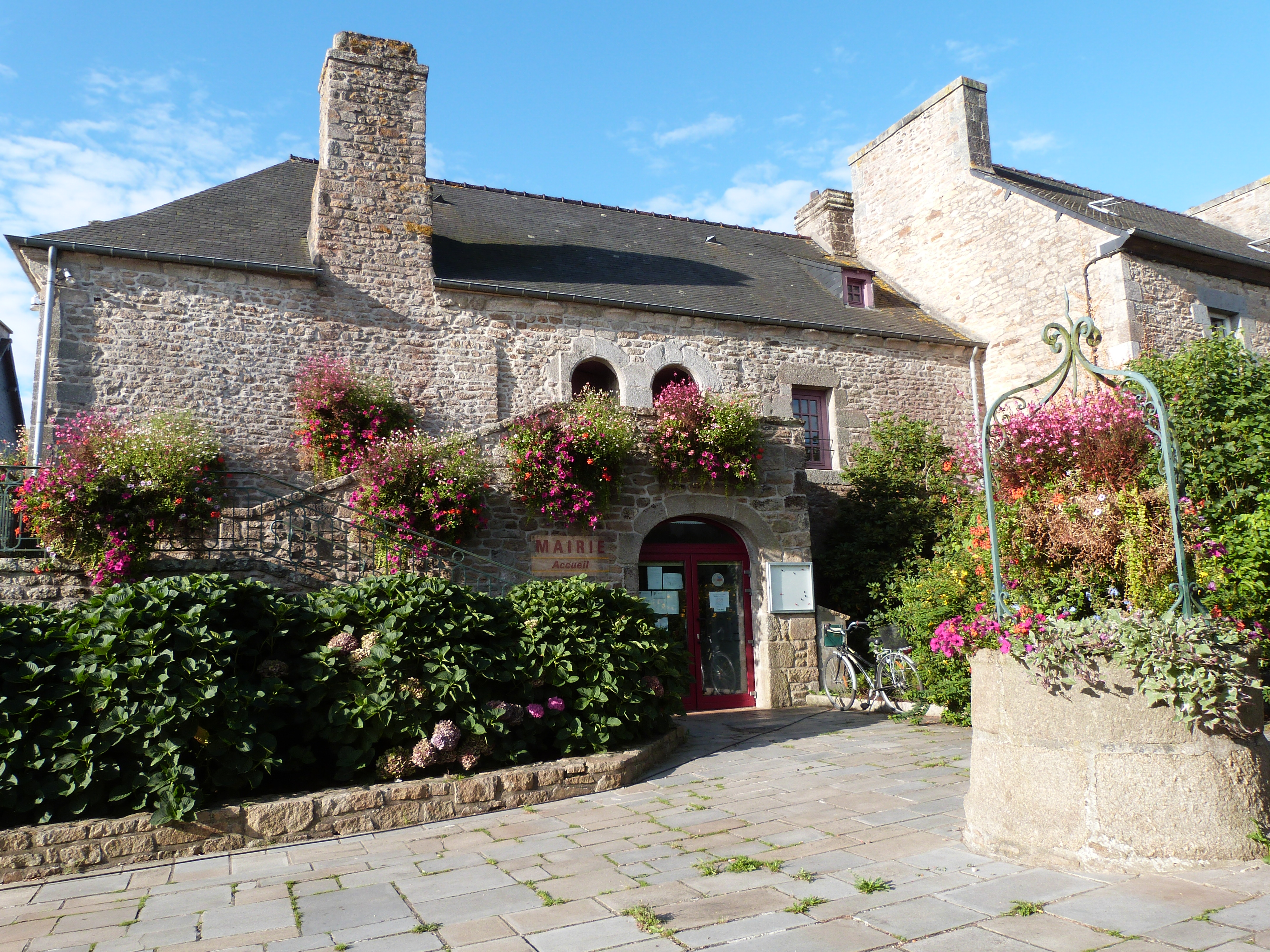 Façade de la mairie et le puits du 17ème siècle de Collinée